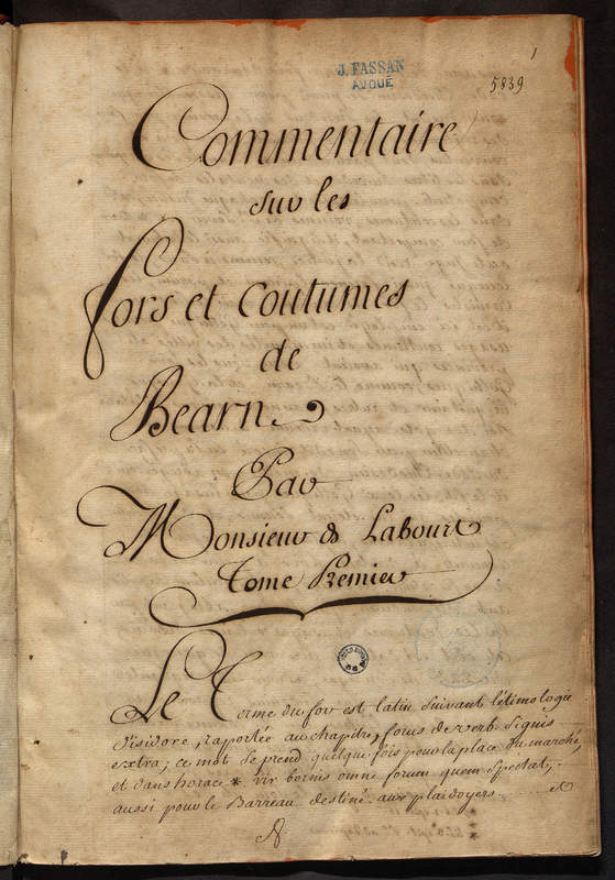 Commentaire sur les fors et coutumes de Bearn, par Monsieur de Labourt. Tome I